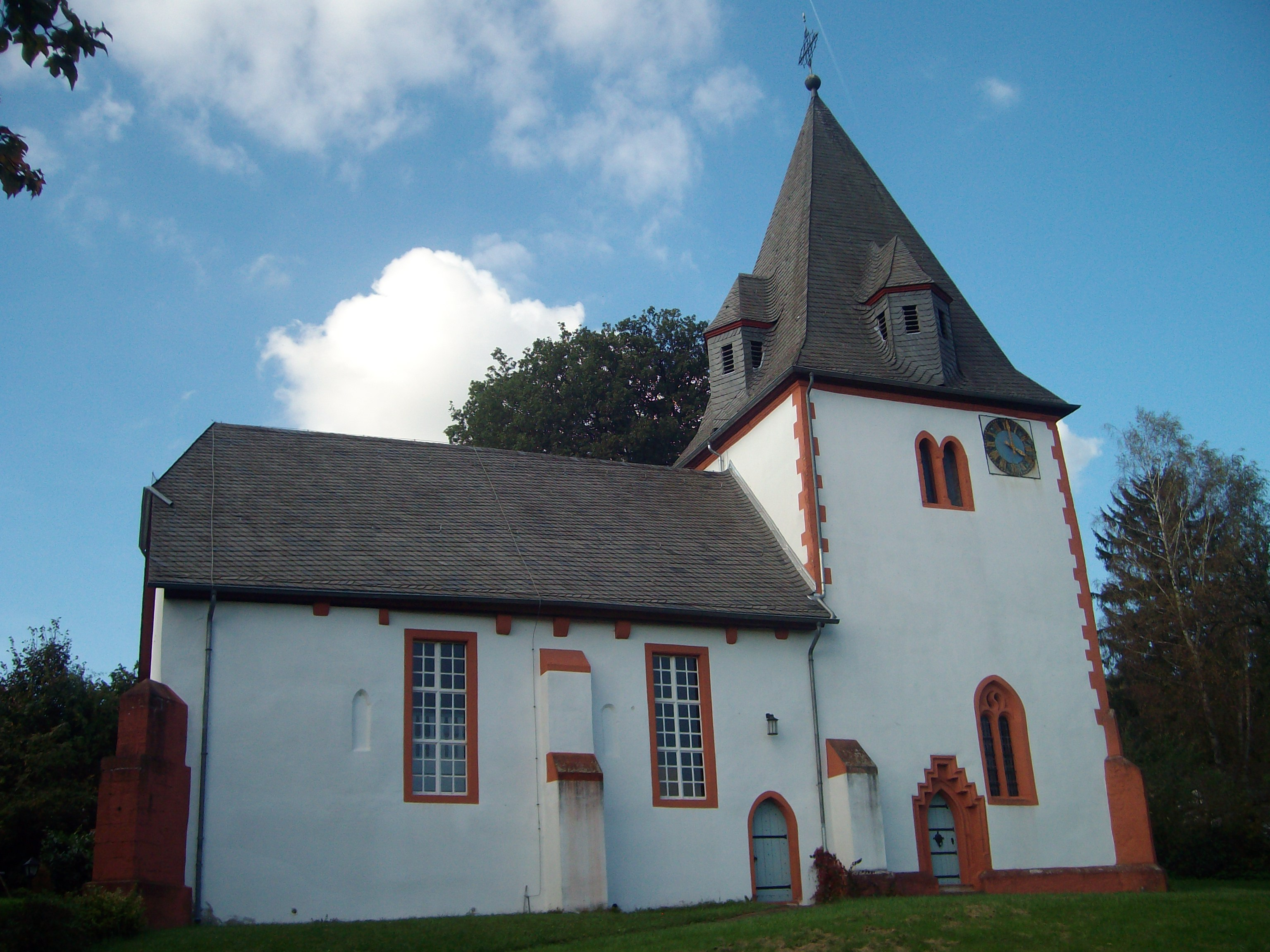 Südeite der Evangelischen Kirche Gonterskirchen, Laubach, Landkreis Gießen, Hessen, Deutschland